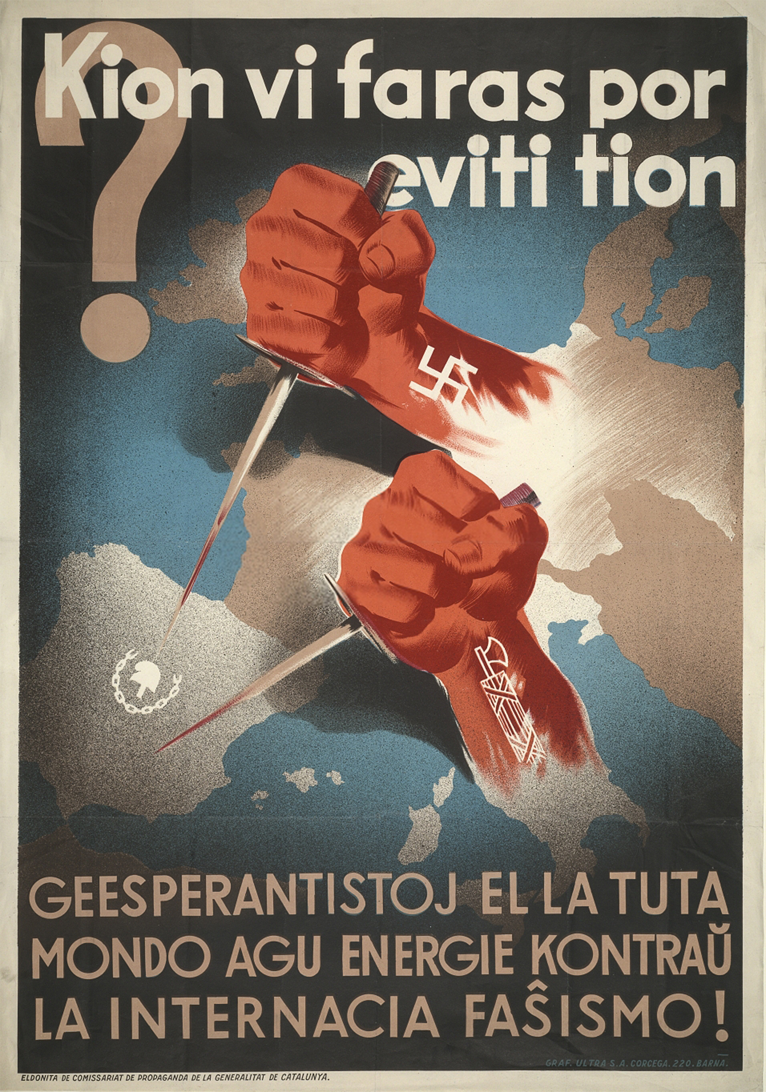 Kion vi faras por eviti tion? Geesperantistoj el la tuta mondo agu energie kontraŭ la internacia faŝismo! — propaganda afiŝo de la hispana enlanda milito